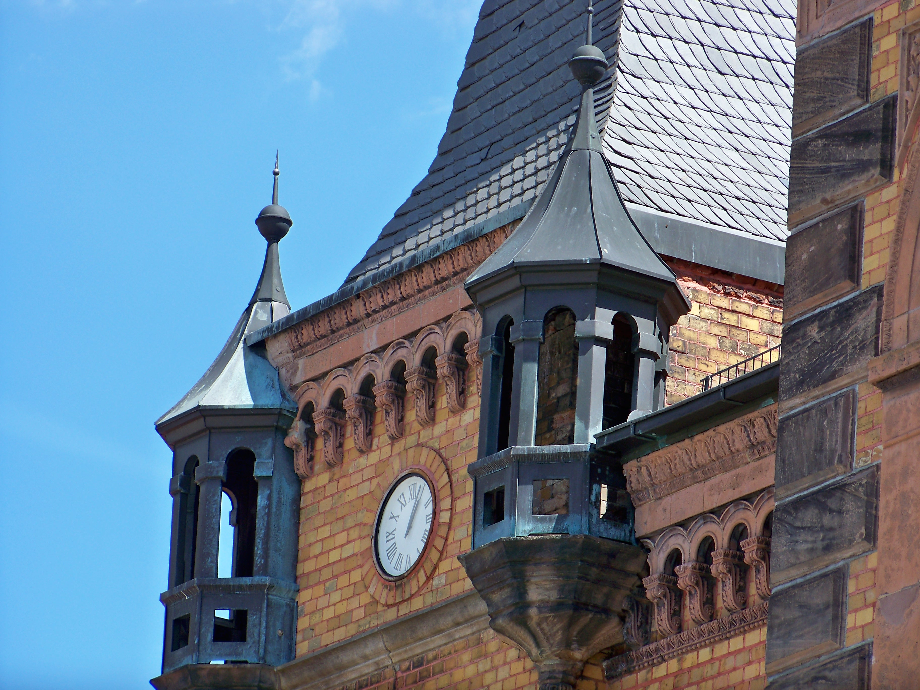 Uhr des Rathauses in Calbe (Saale)